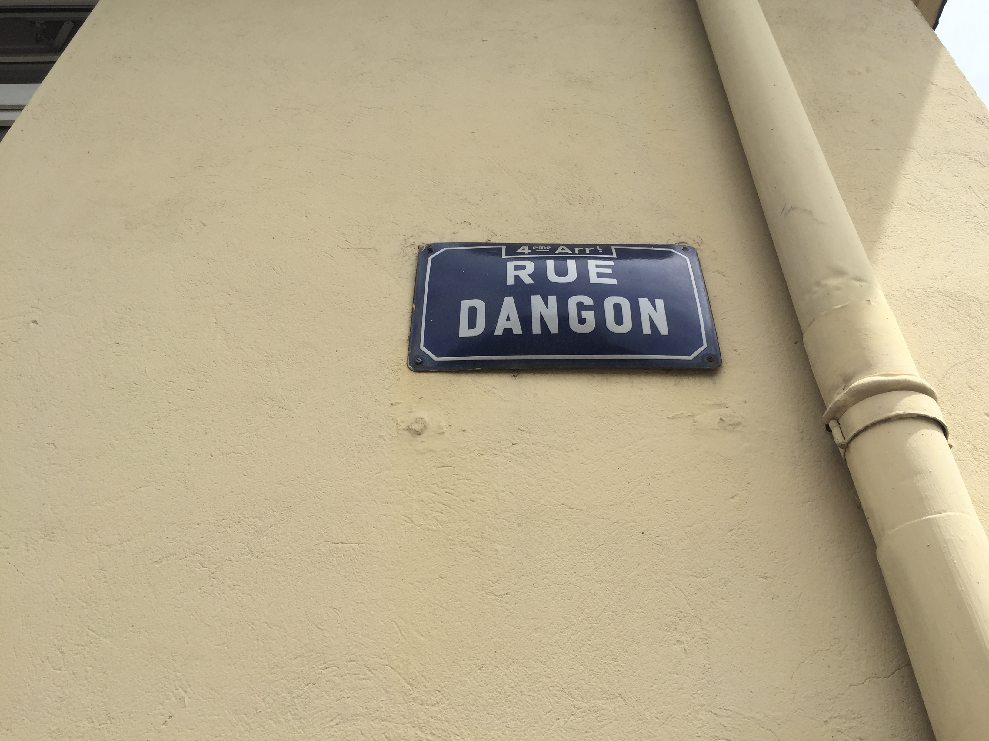 Plaque Rue Dangon (Lyon).